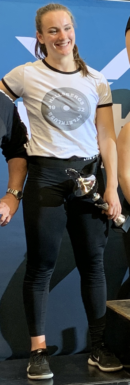 Vilma Olsson, den 13 oktober 2019, på styrkelyftstävlingen Tyngre Powerlifting Invitational, på eventet Tyngre 8, i Solnahallen i Stockholm.